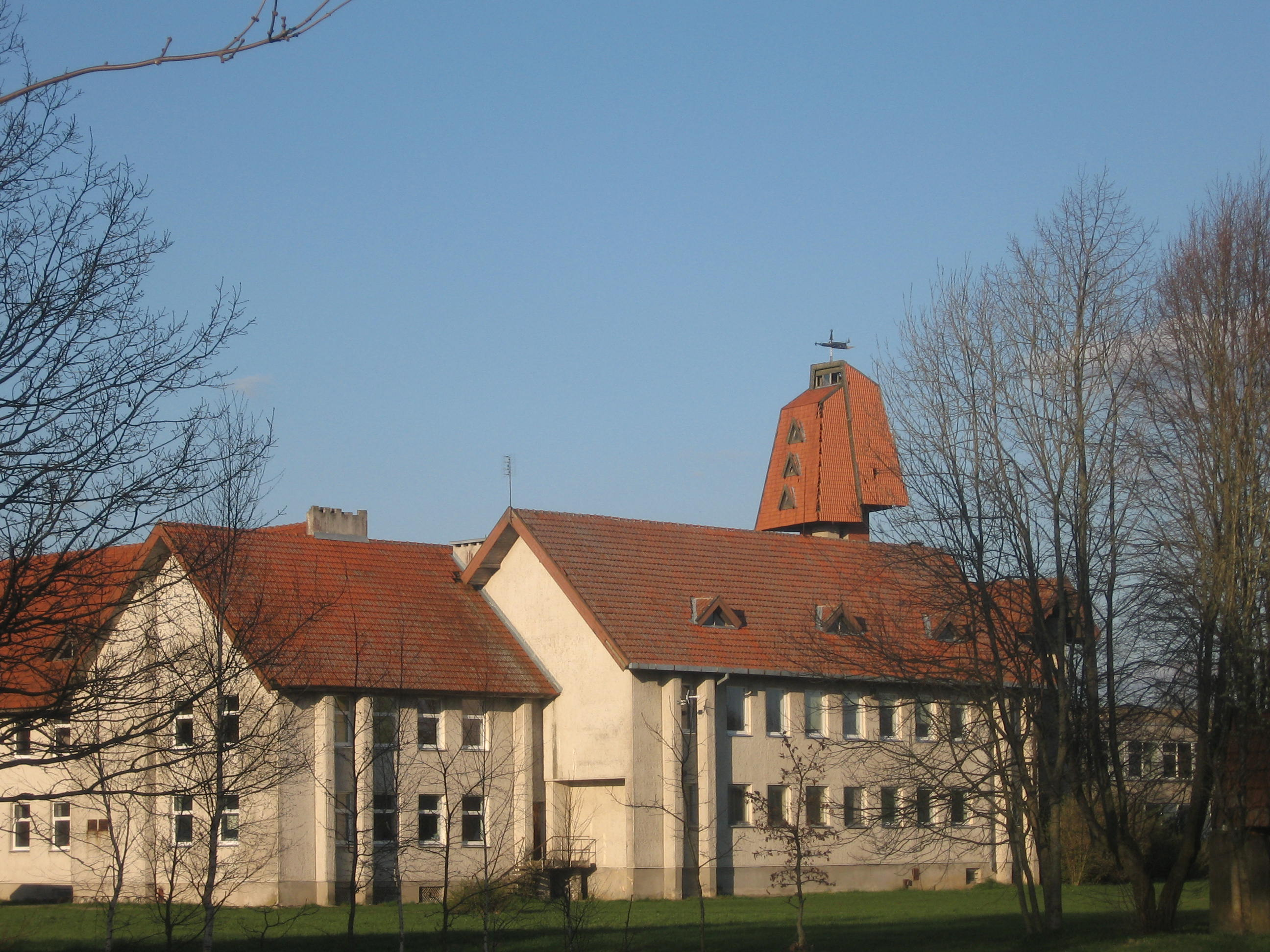 Juknaičiai. Sveikatingumo kompleksas